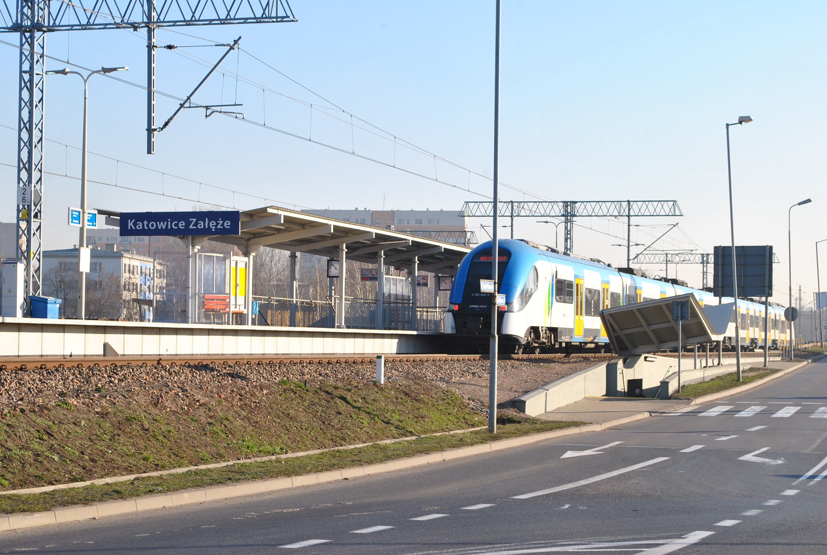 Przystanek kolejowy Katowice Załęże. 27WEb Kolei Śląskich na przystanku